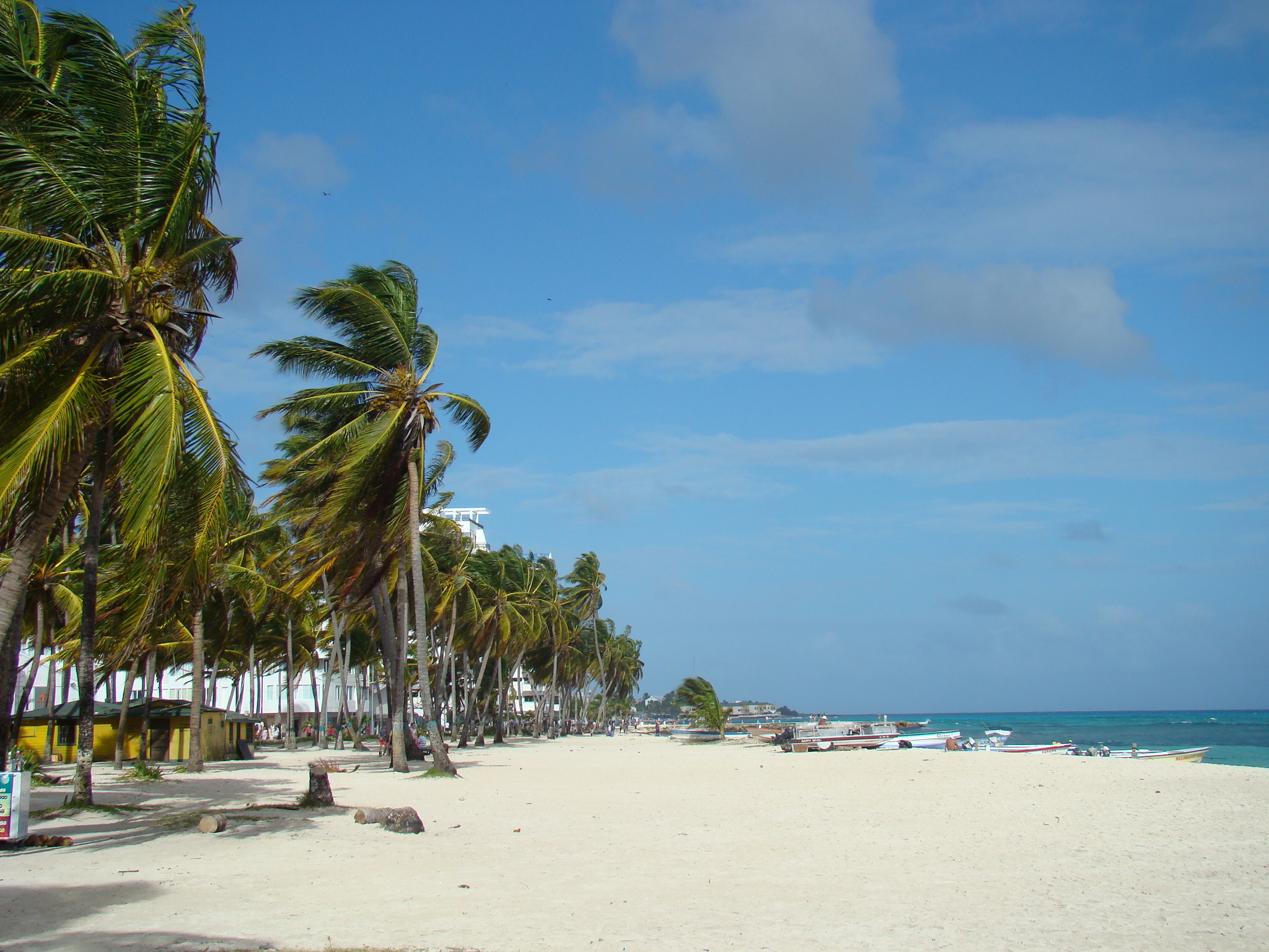 Isla de San Andres en Colombia